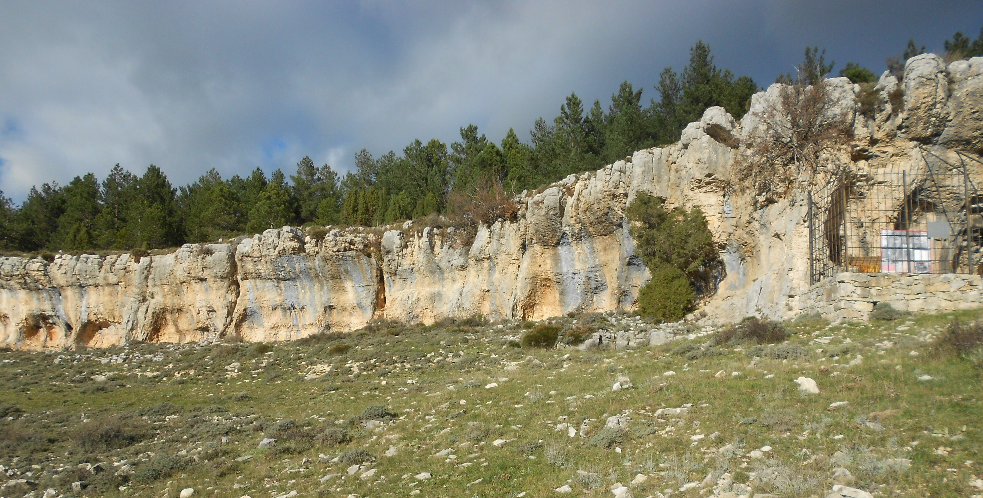 Barranco de Givert en el término municipal de Mosqueruela (España). Contiene representaciones de arte rupestre.